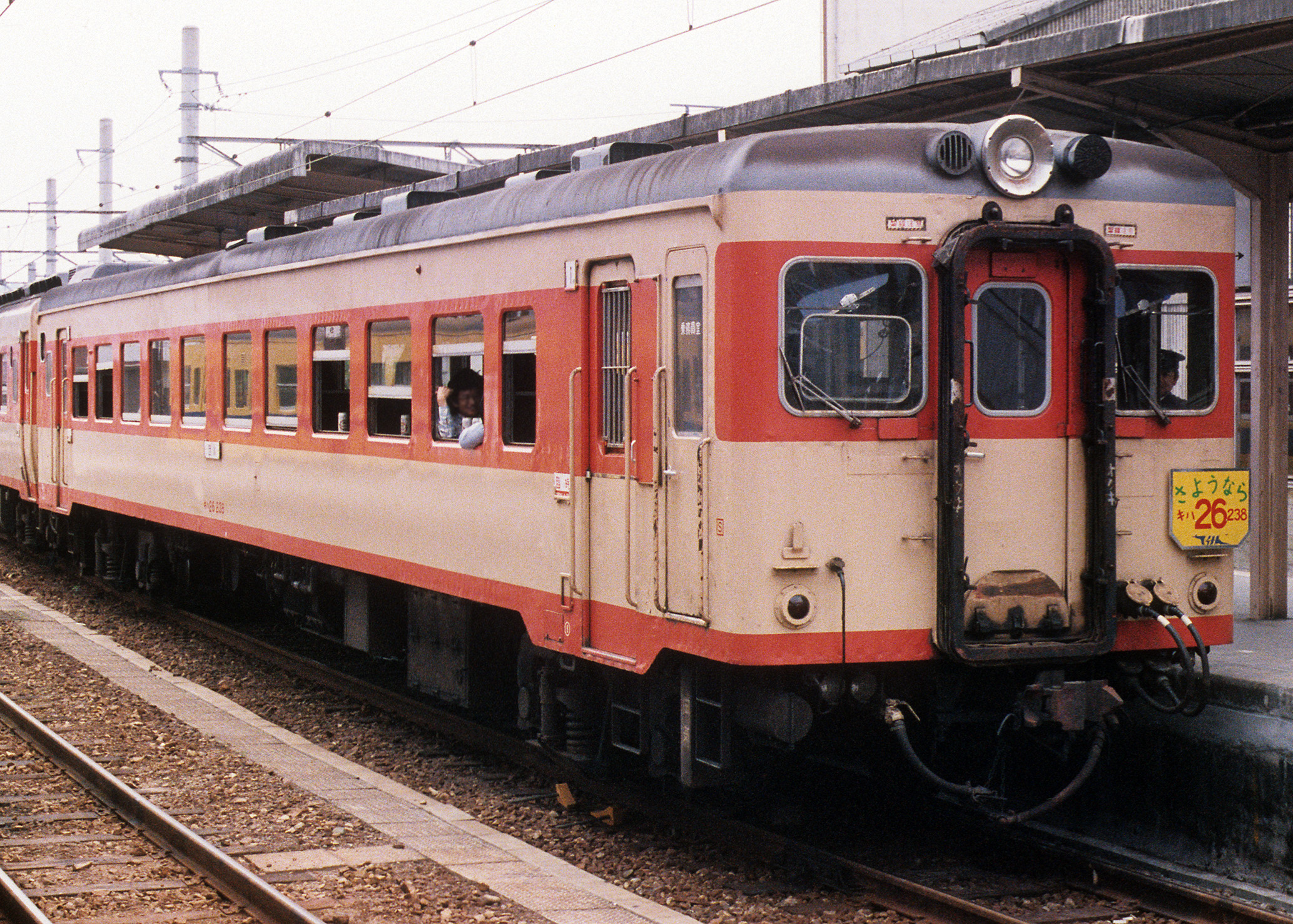 国鉄キハ26 238